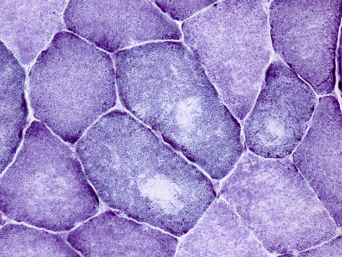 Enzymhistochemie. NADH-Färbung eines Muskelbiopsats mit Störungen des intermyofibrillären oxidaten Netzwerkes.